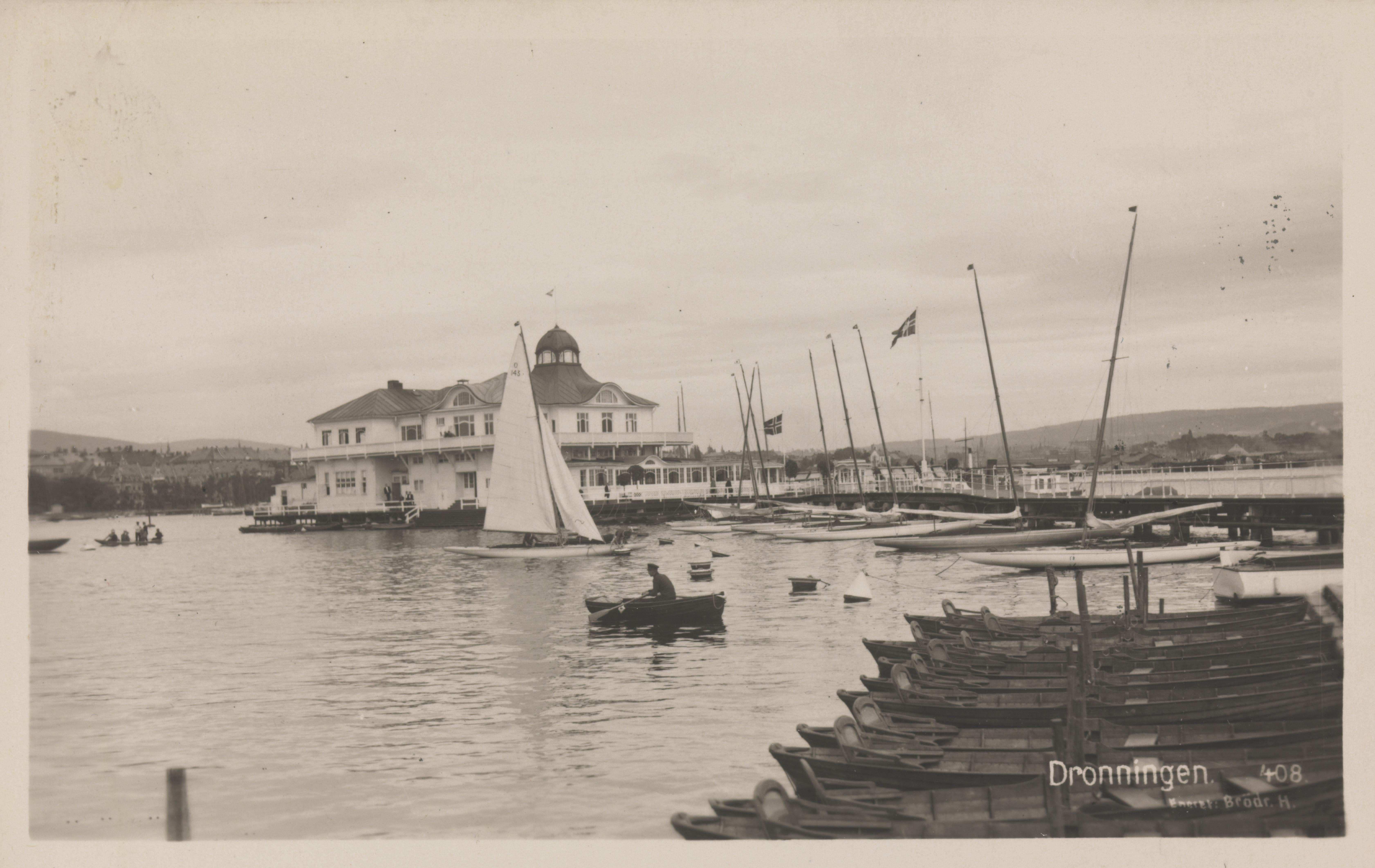 Dronningen sleskapslokale. Arkitekter: Ekman & Smith, 1902. Brant ned til grunnen 1929. Erstattet med nytt bygg av Bjercke & Eliassen. Bildet er hentet fra Nasjonalbibliotekets bildesamling